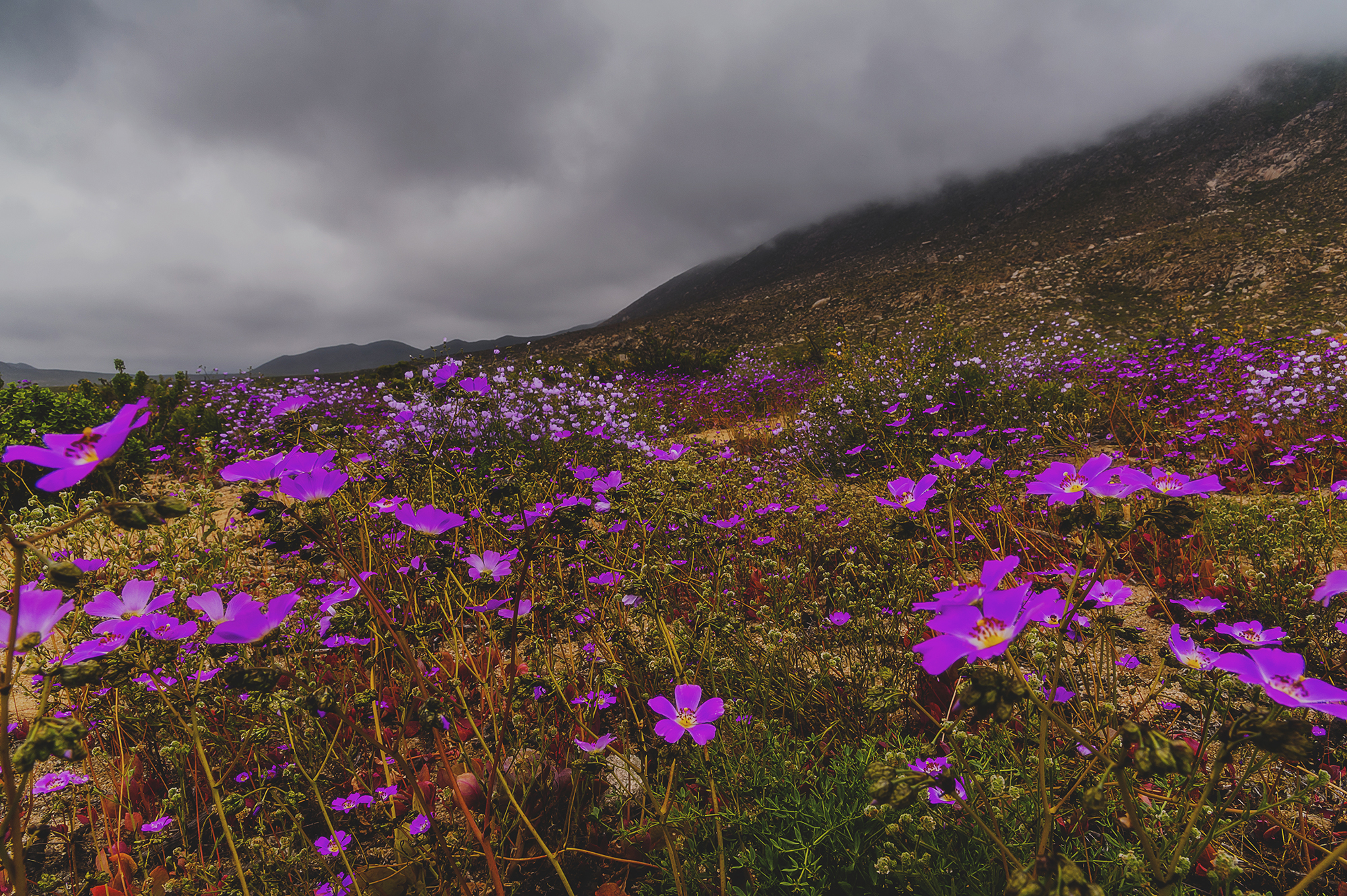 Parque nacional Llanos de Challe es un área natural protegida en Chile, localizado en la costa de la III Región de Atacama. Posee 45.708 hectáreas. Creado por el Decreto Nº 946 del 29 de julio de 1994. El parque presenta un ecosistema desértico costero, que forma el hábitat de raras especies y bellas de plantas, incluyendo a la especie leontochir Ovallei en estado vulnerable, conocida localmente como Garra de león.